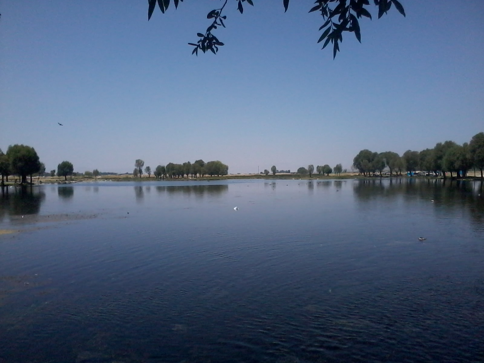 manzara